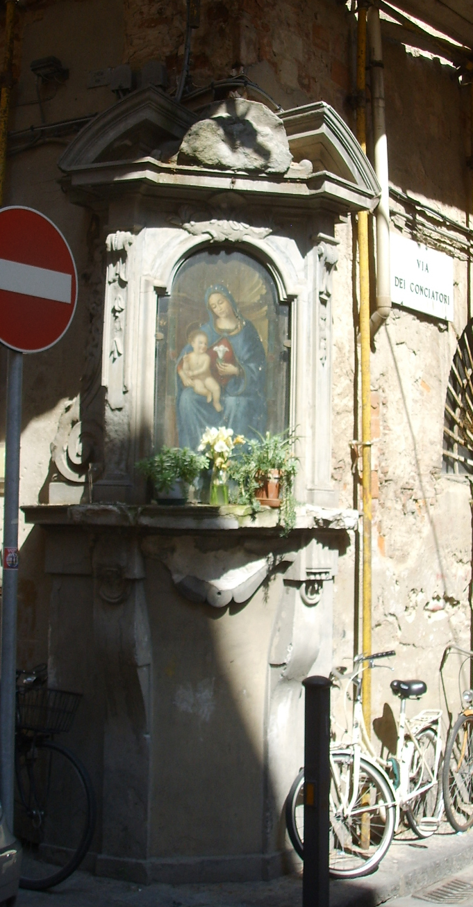 Via de' conciatori, tabernacolo settecentesco